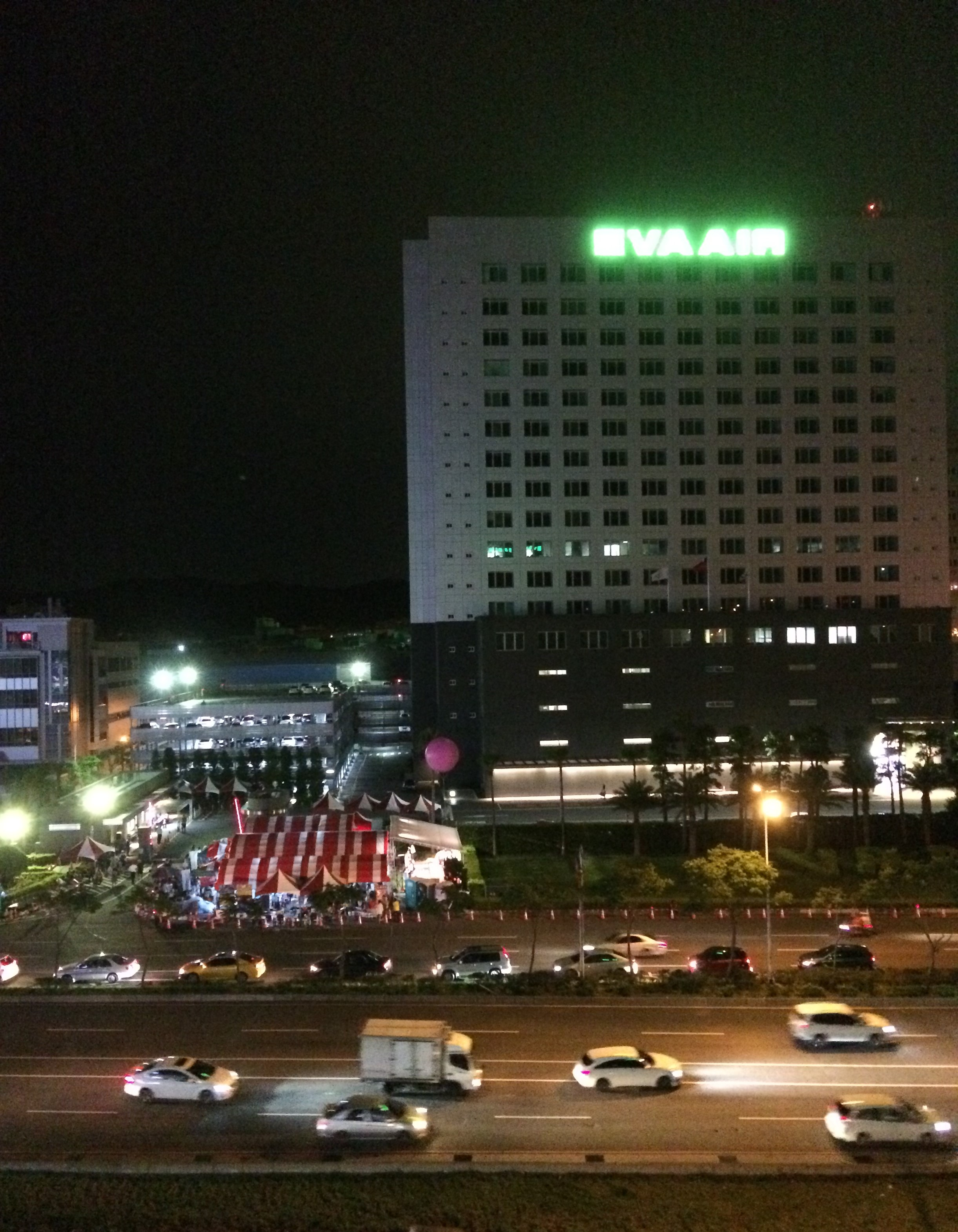 中文（台灣）: 2019年長榮航空罷工事件